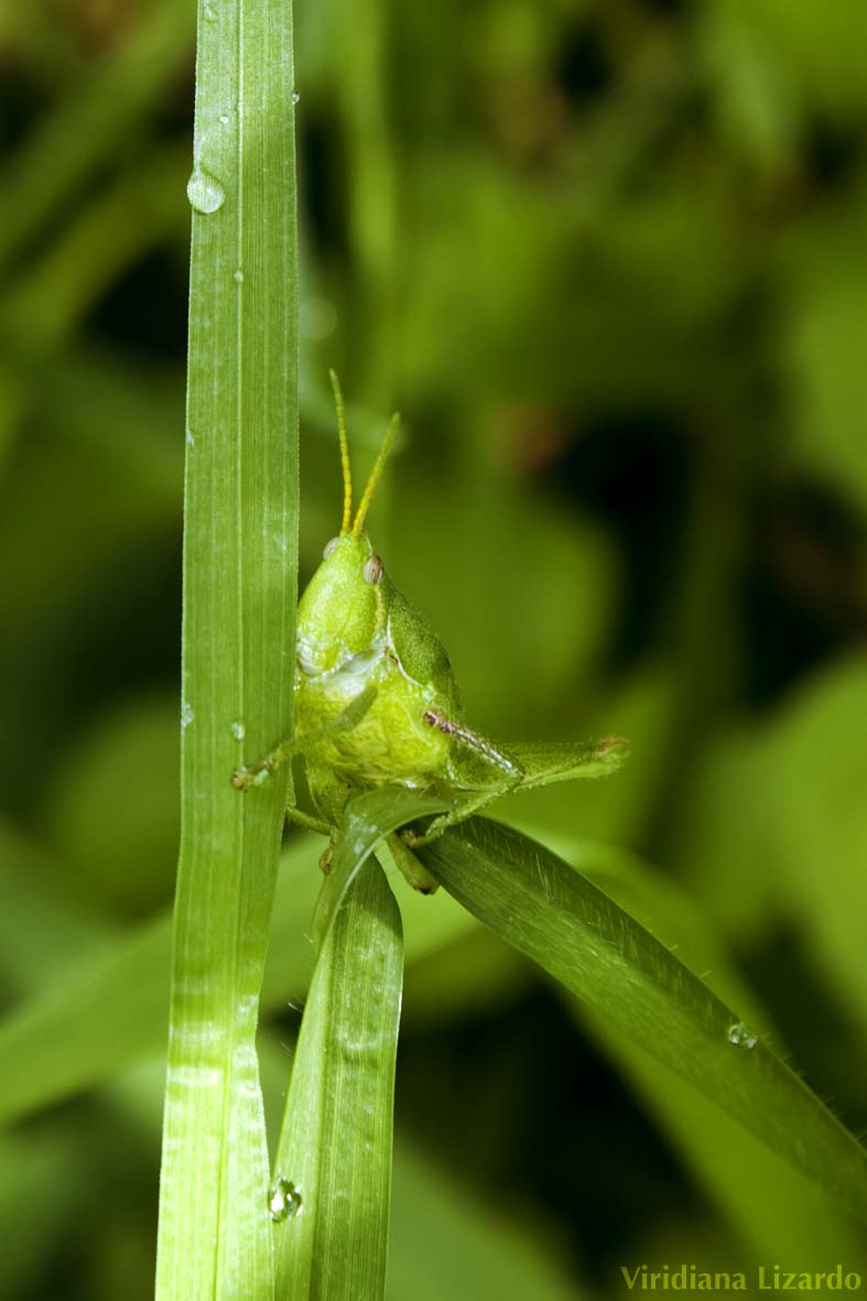 Chapulín en la Reserva Pedregal de San Ángel, Distrito Federal.